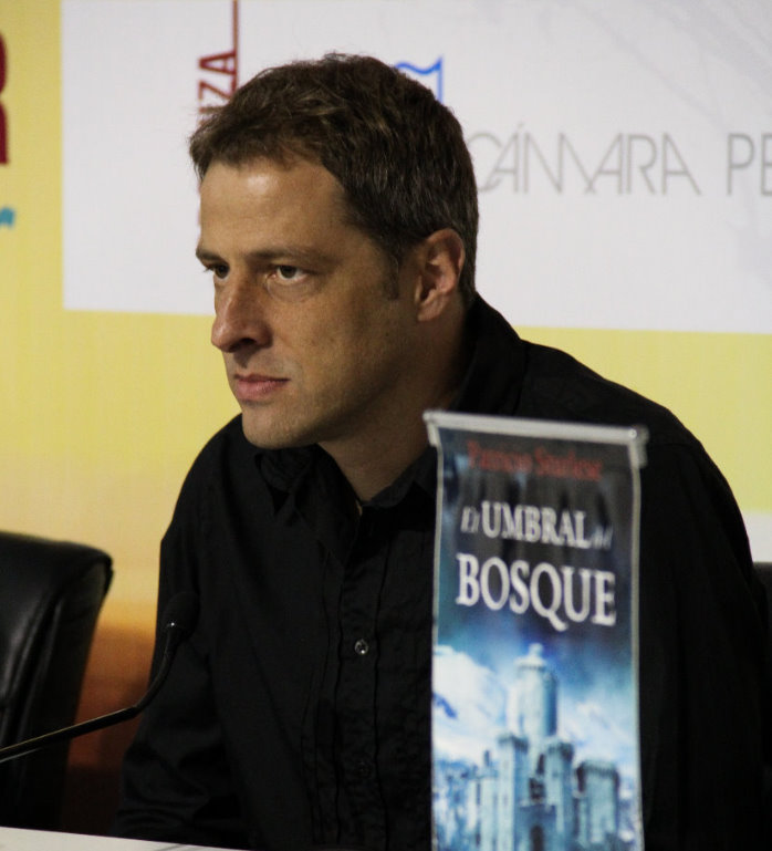 Durante la presentación en Perú, en 2013.